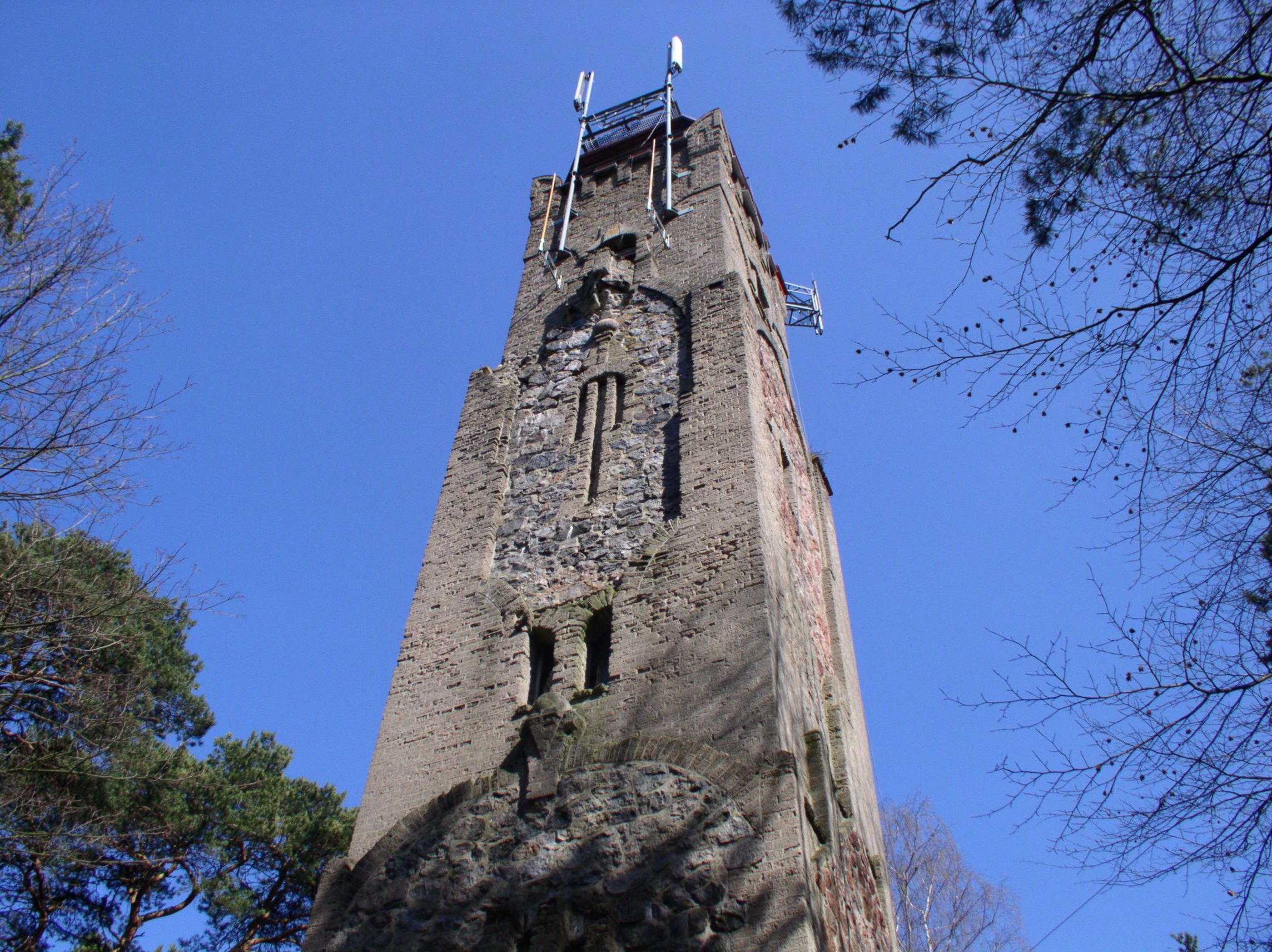 Wieża Bismarcka w Okonku niem. Ratzebuhr in Pommern (obecna nazwa Wieża Tecława) - stoi na Górze Tecława. Budowę tej 24 metrowej wieży zainicjowało Zrzeszenie Użyteczności Publicznej w Okonku pod przewodnictwem Naczelnika Poczty Ernsta Nitschke ze Szczecinka. Głównym wykonawcą prac budowlanych była firma Steltera z Okonka. Na miejsce budowy wieży wybrano, leżące na północ od miasta, Wzgórze Tecława (191 m.n.p.m.). Kamień węgielny pod budowę położono 01.04.1908r. Koszt budowy wyniósł 12.000 marek, a całą inwestycję sfinansowano z dobrowolnych datków, loterii oraz reklamy. Za materiał budowlany posłużyła cegła i beton (wiązanie krzyżowe) oraz kamienie granitowe (mur cyklopowy). Drewnianymi schodami (86 stopni) można było wejść na platformę widokową. Na wieży przymocowano płaskorzeźbę Bismarcka z brązu, wykonaną w odlewni w Mannheim. Okna herbowe oprawiono kolorowym szkłem. Przed wieżą postawiono 4 metrowy pomnik obelisk z orłem ku czci poległych. W uroczystościach poświęcenia wieży w dniu 23.08.1908r. udział wzięły liczne Związki i mieszkańcy Okonka, równocześnie odbyło się uroczyste odsłonięcie pomnika oraz nadanie "Orderu Orła" 4 klasy burmistrzowi Semmowi. Wieczorem na wieży dokonano inauguracyjnego rozpalenia "ognia ku czci Bismarcka".